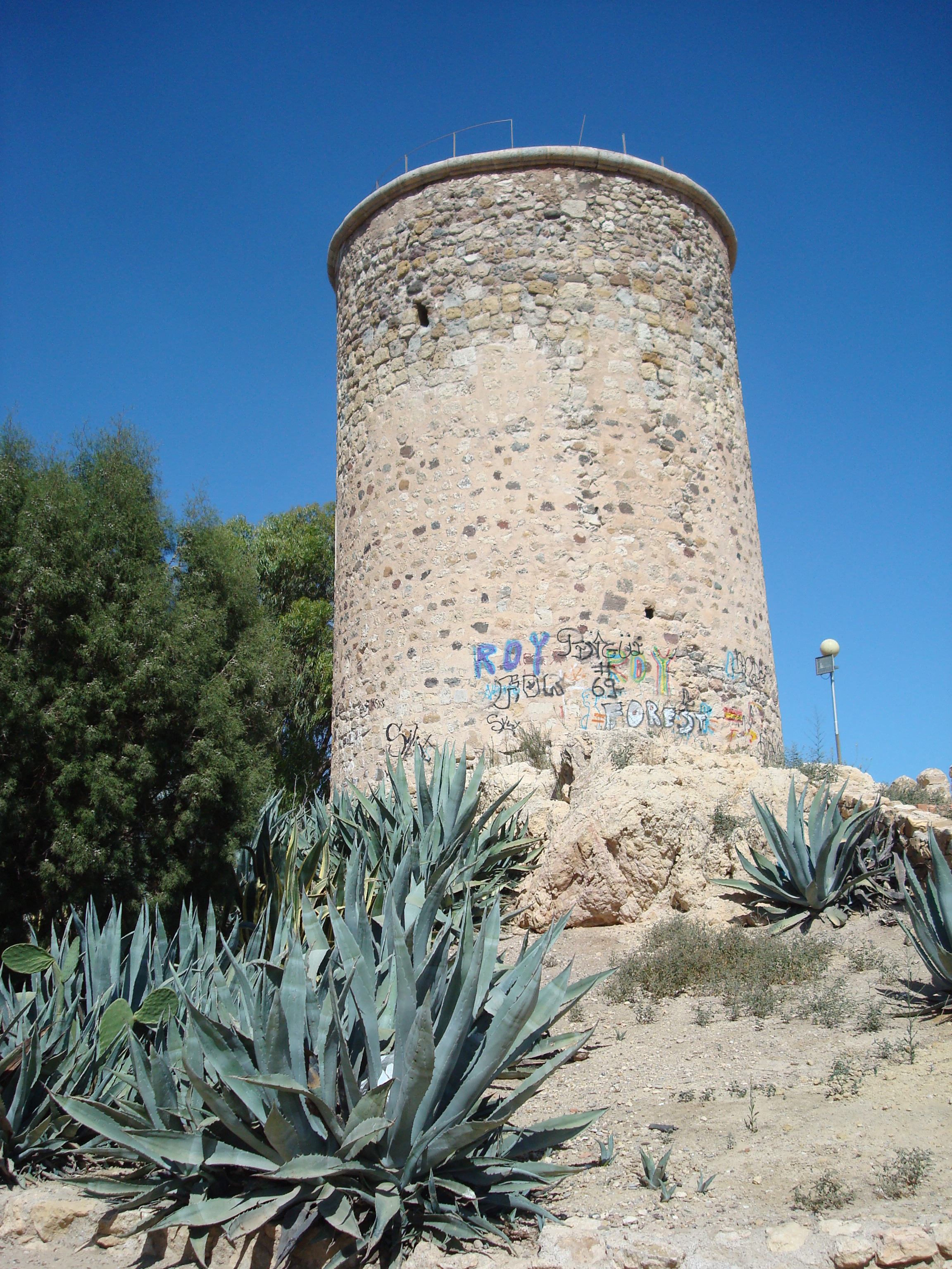 Mazarron Costa - 006